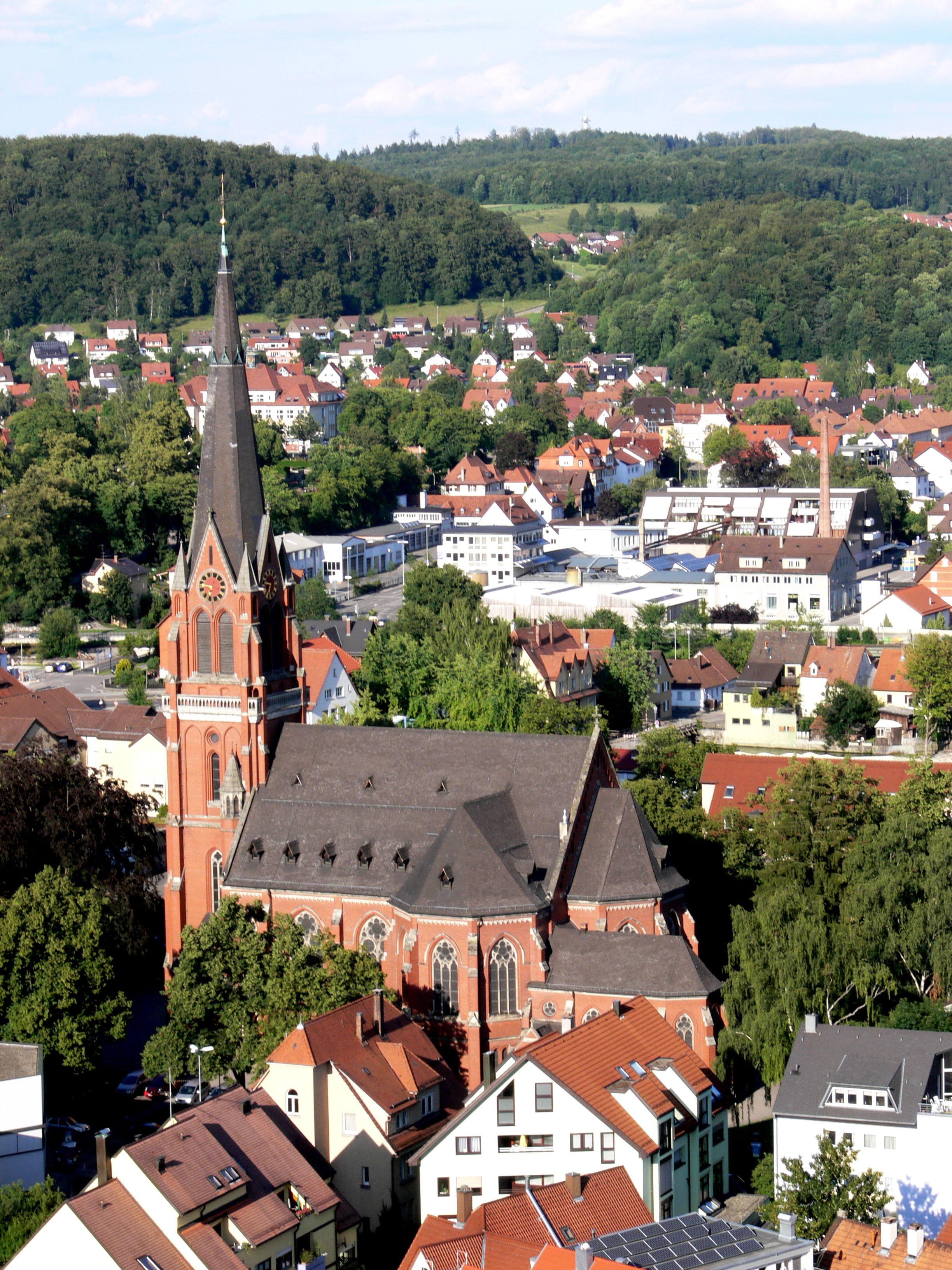 Heidenheim an der Brenz, Ev. Pauluskirche (gesehen von Schloss Hellenstein)